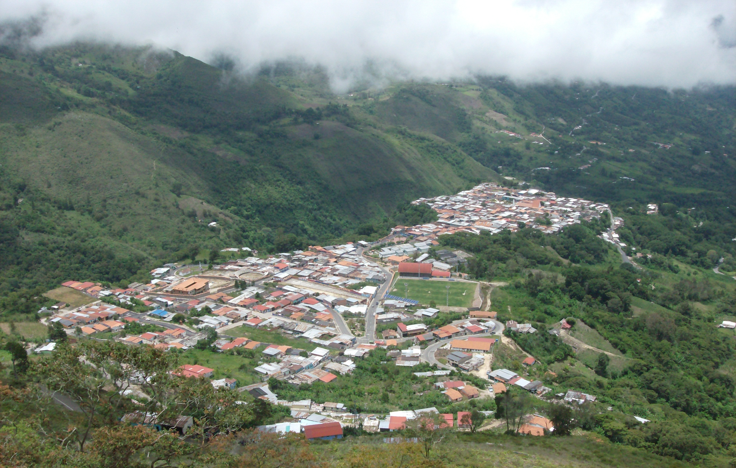 Panoramica de la localidad de Queniquea, Edo. Táchira, Venezuela